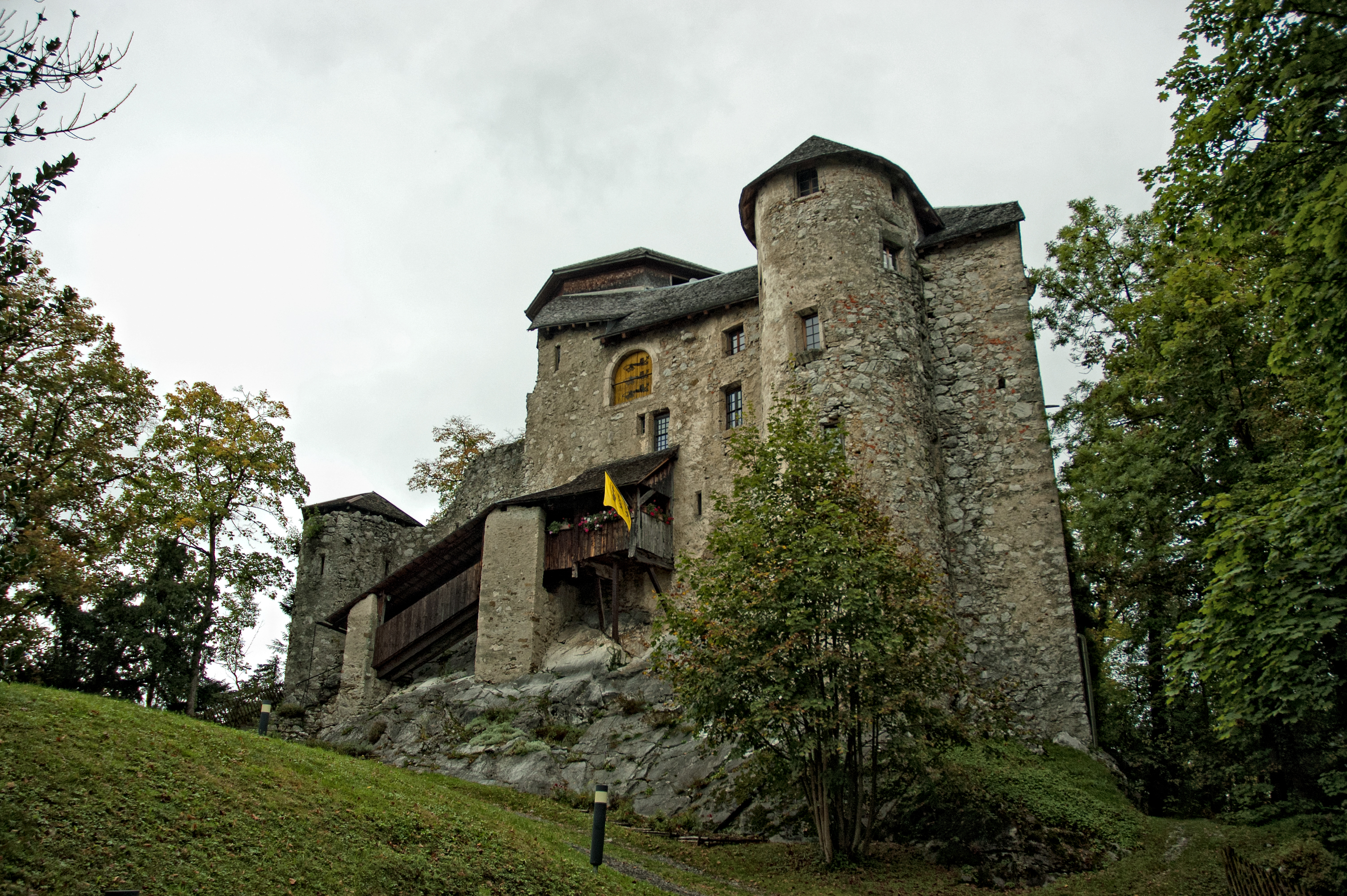 Hohenems, Burg Neu-Ems ("Schloss Glopper") Dieses Bild wurde anlässlich des österreichischen Tags des Denkmals 2012 in Vorarlberg eingereicht.